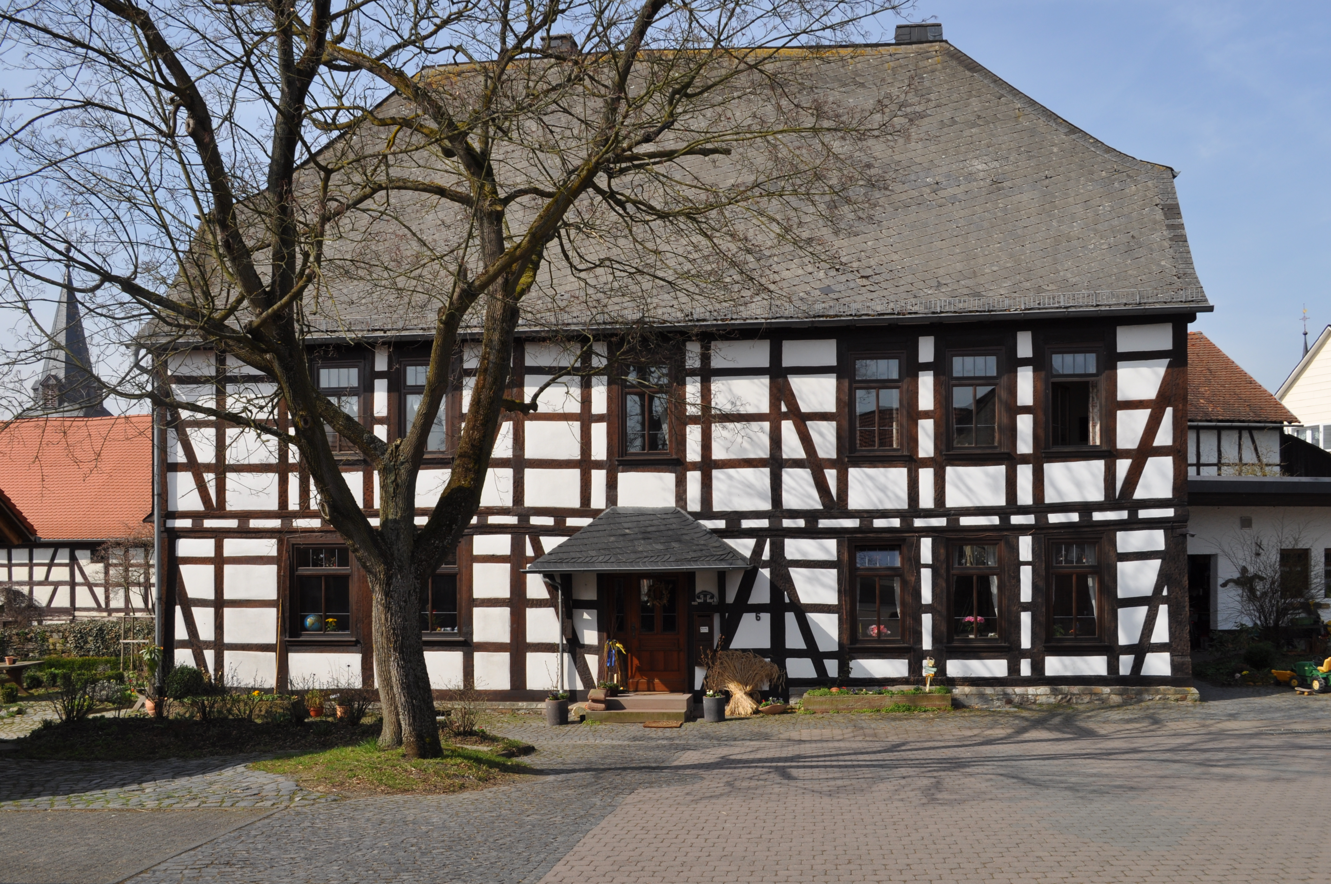 Haupthaus des Hofes von Fauer Etzel in Wehrheim, früher kurtrierischer Amtshof des Amtes Wehrheim